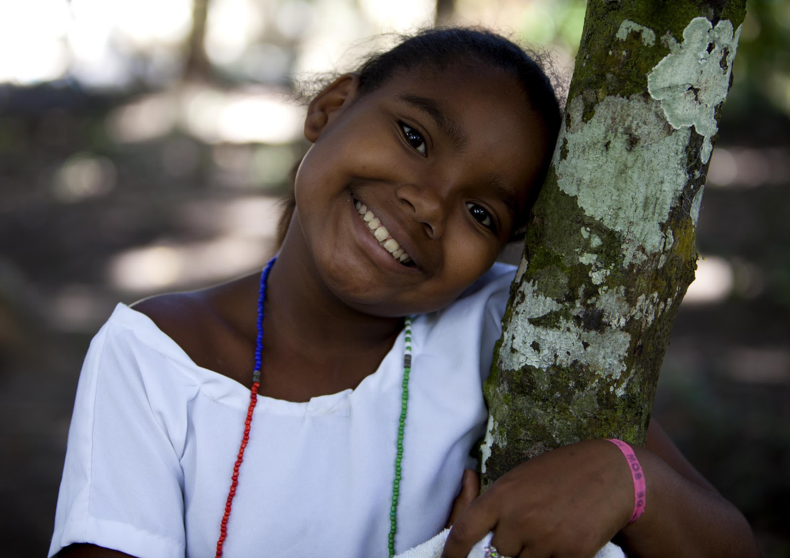 Crianças do Caxuté